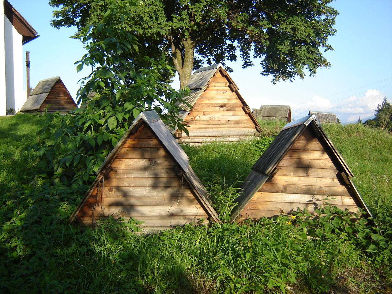 Pivničky na zemiaky.